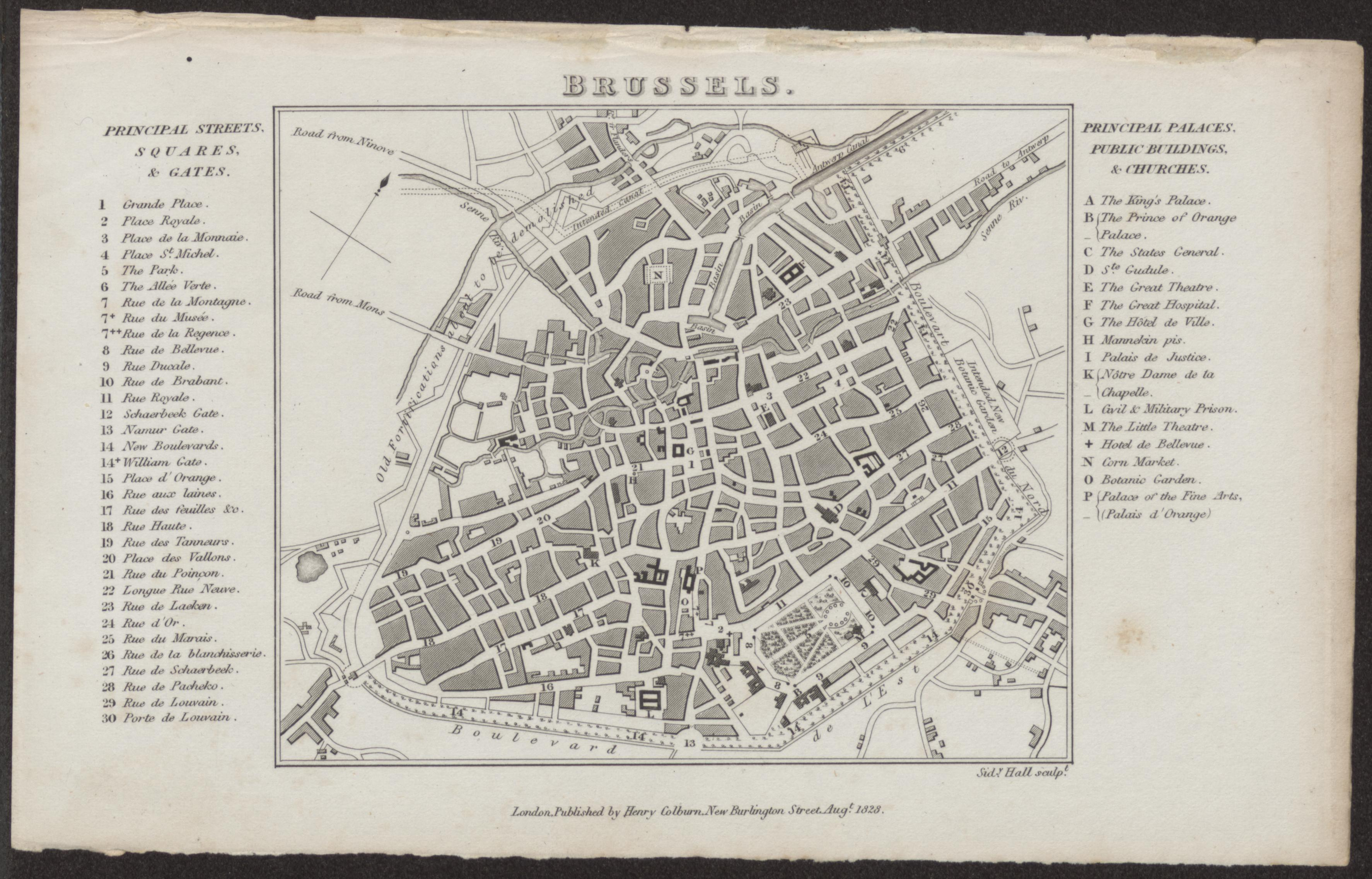 Belgien, Brüssel